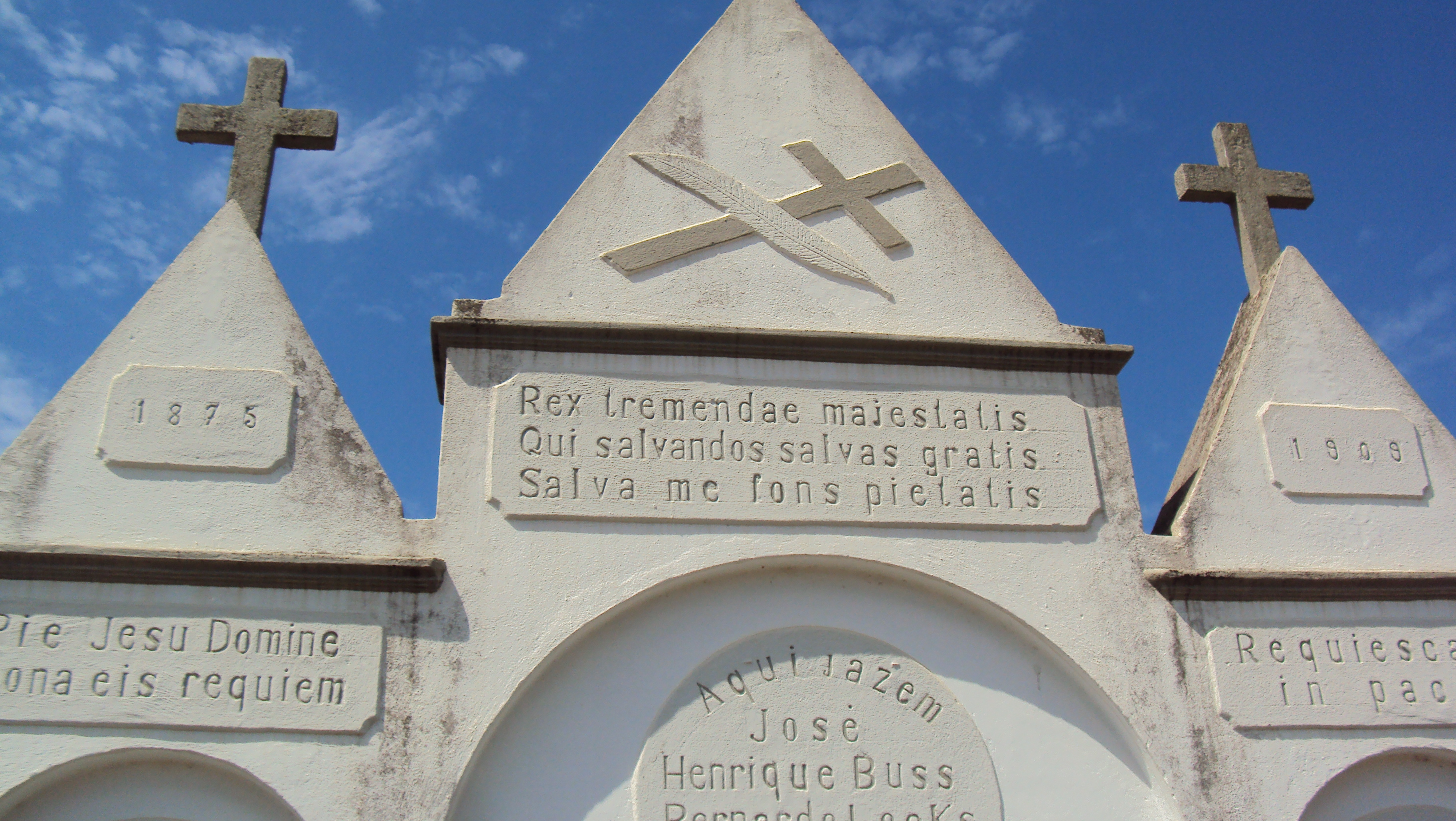 Sepultura coletiva dos imigrantes fundadores da colônia de Braço do Norte